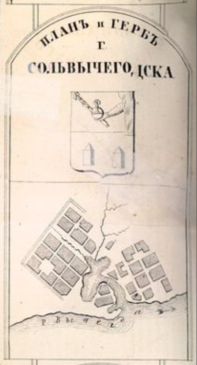 План и герб Сольвычегодска (1846)